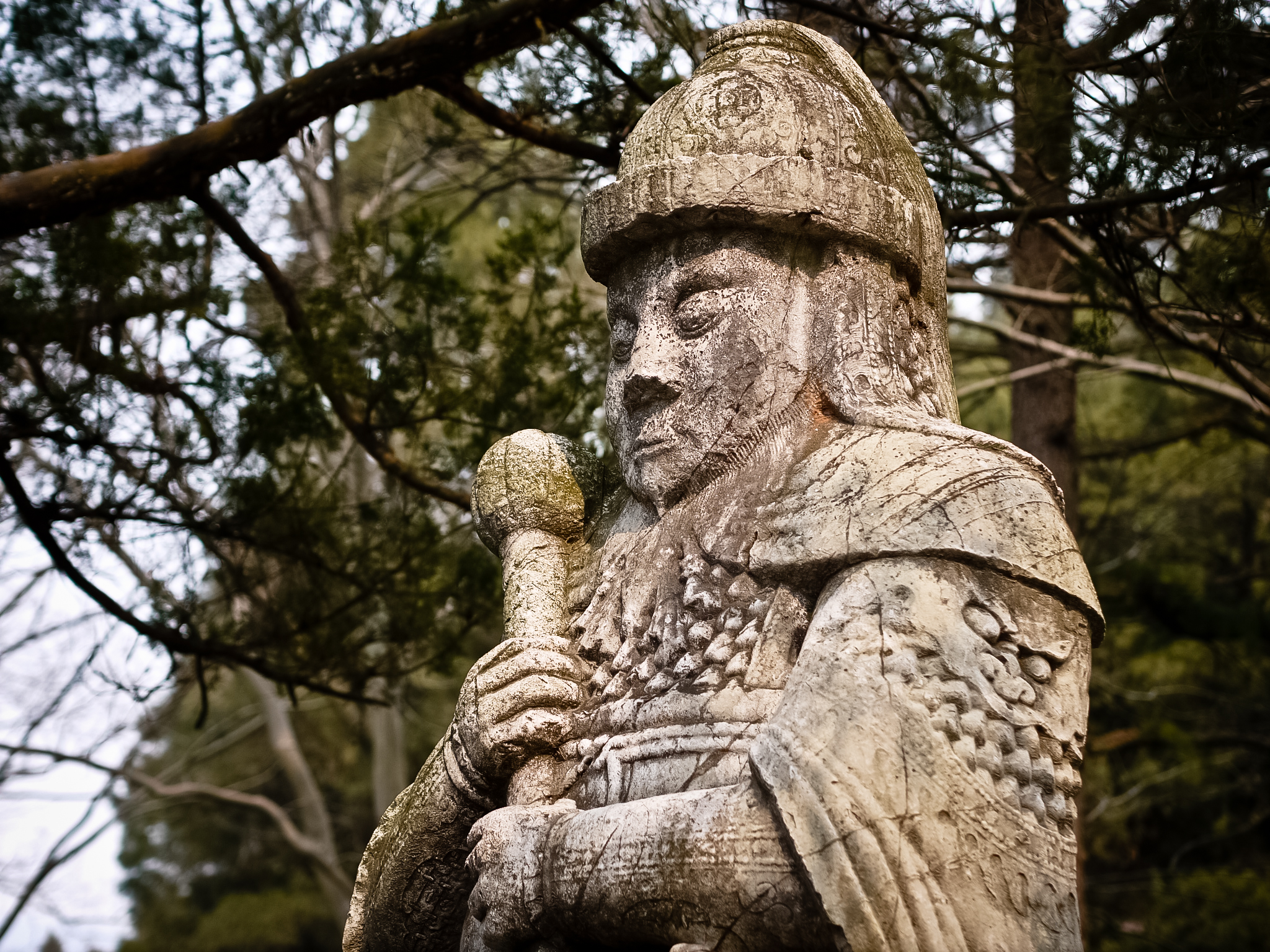 20110310-梅花山 (59 - 73)